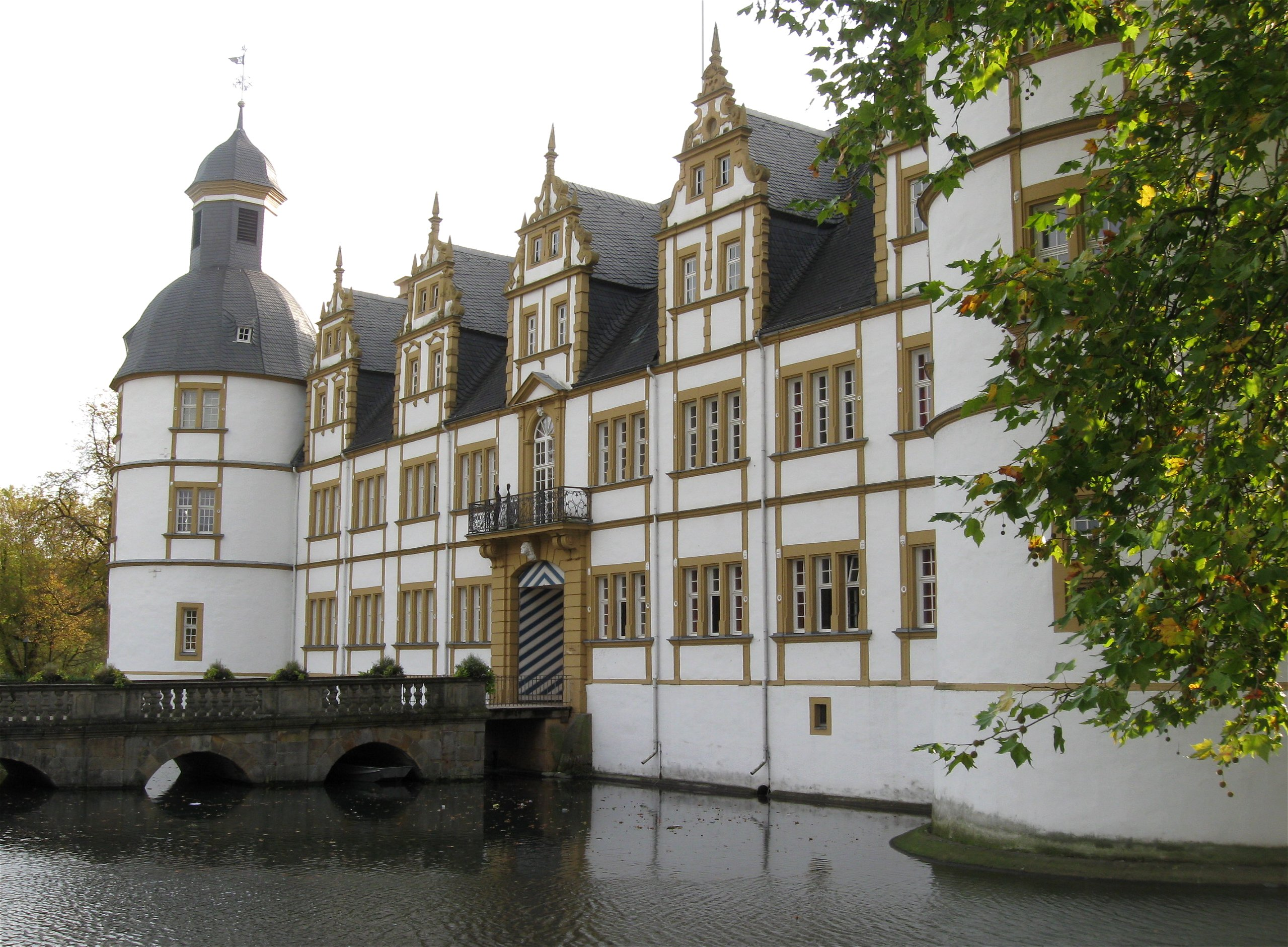 Schloss Neuhaus, Paderborn, am Wasser